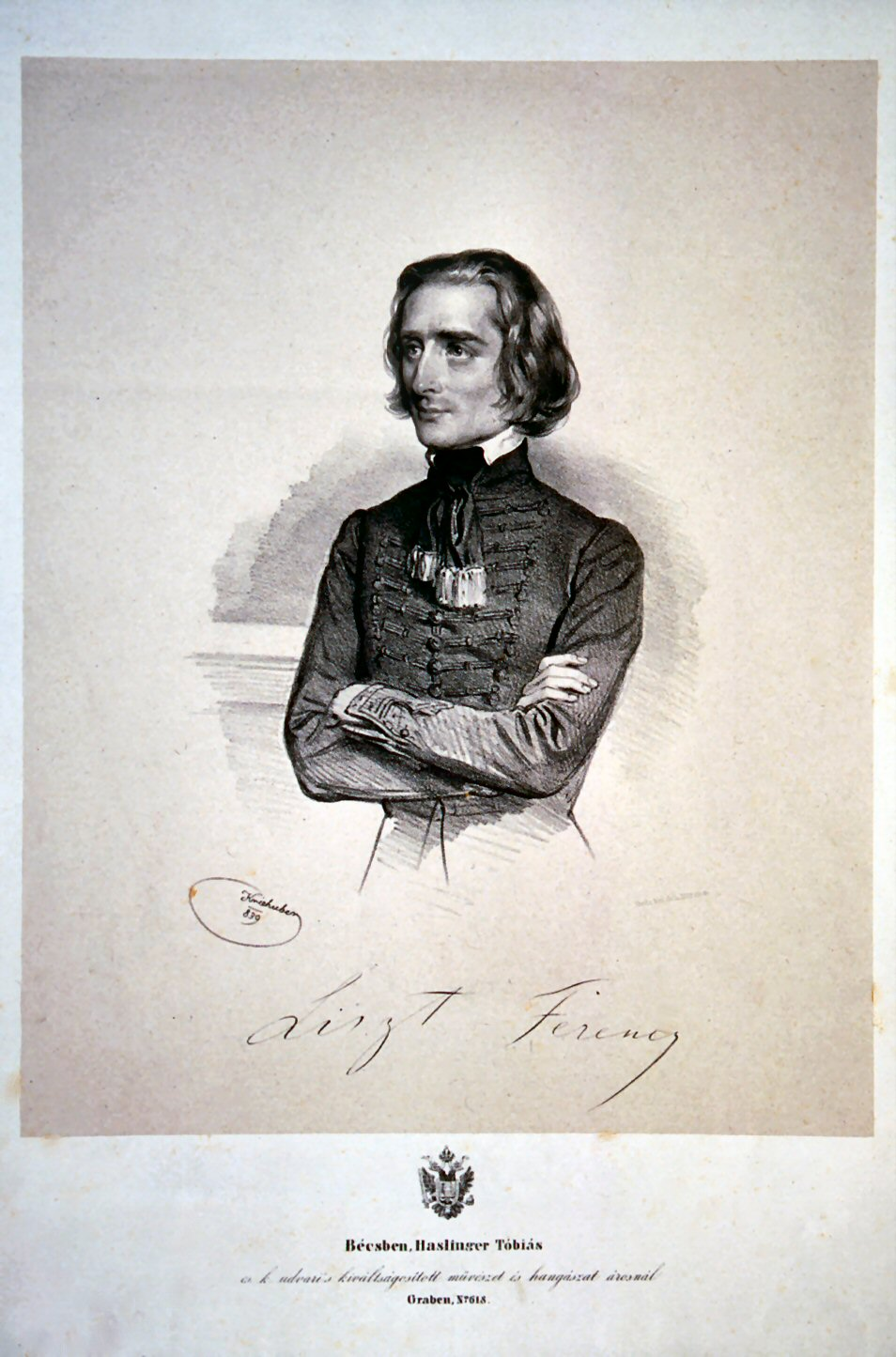 Franz Liszt (1811-1886) Pianist and Composer.label QS:Len,"Franz Liszt (1811-1886) Pianist and Composer." label QS:Lde,"Franz Liszt (1811-1886) Kopmponist und Pianist"